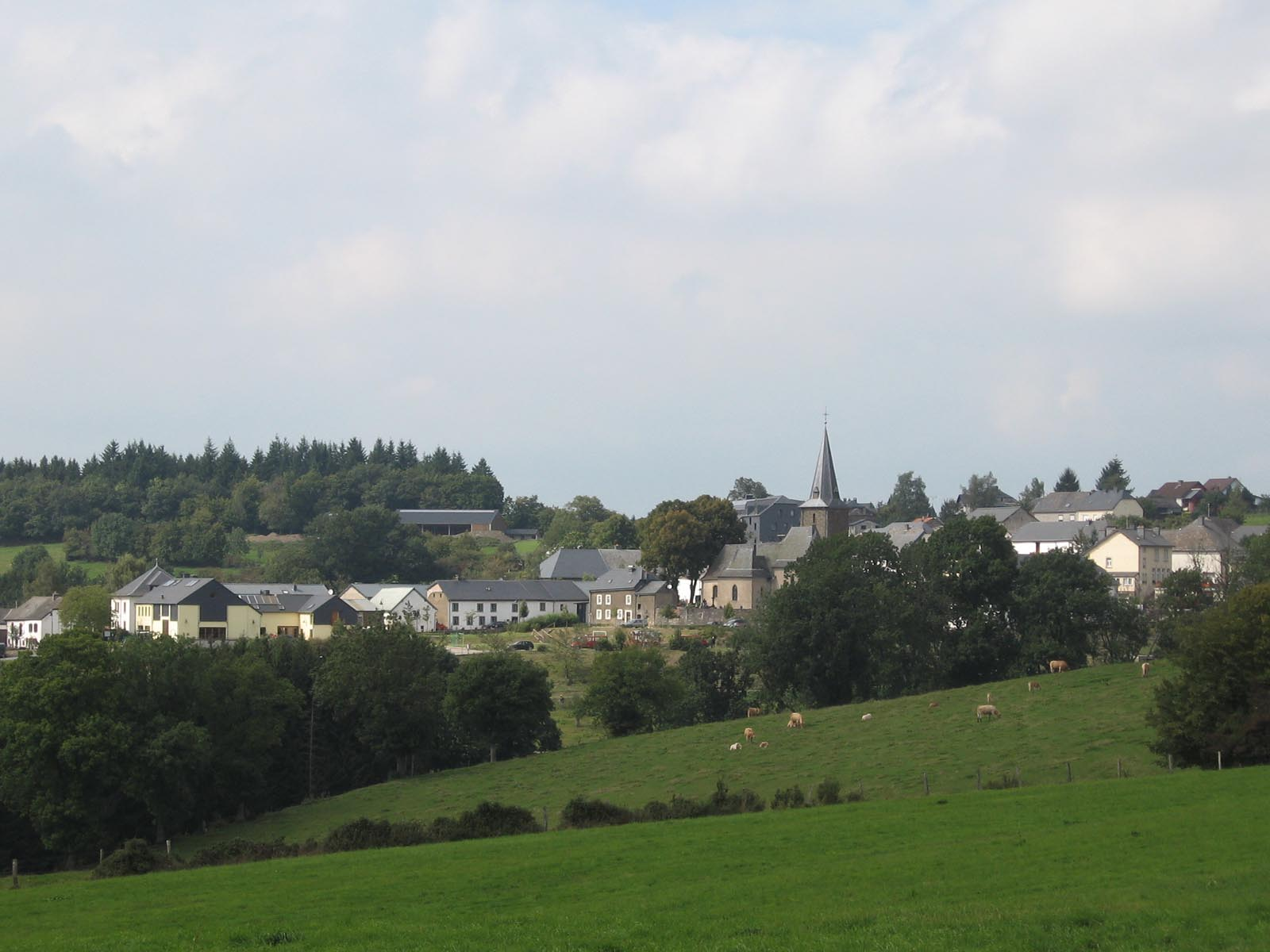 Munshausen plaats